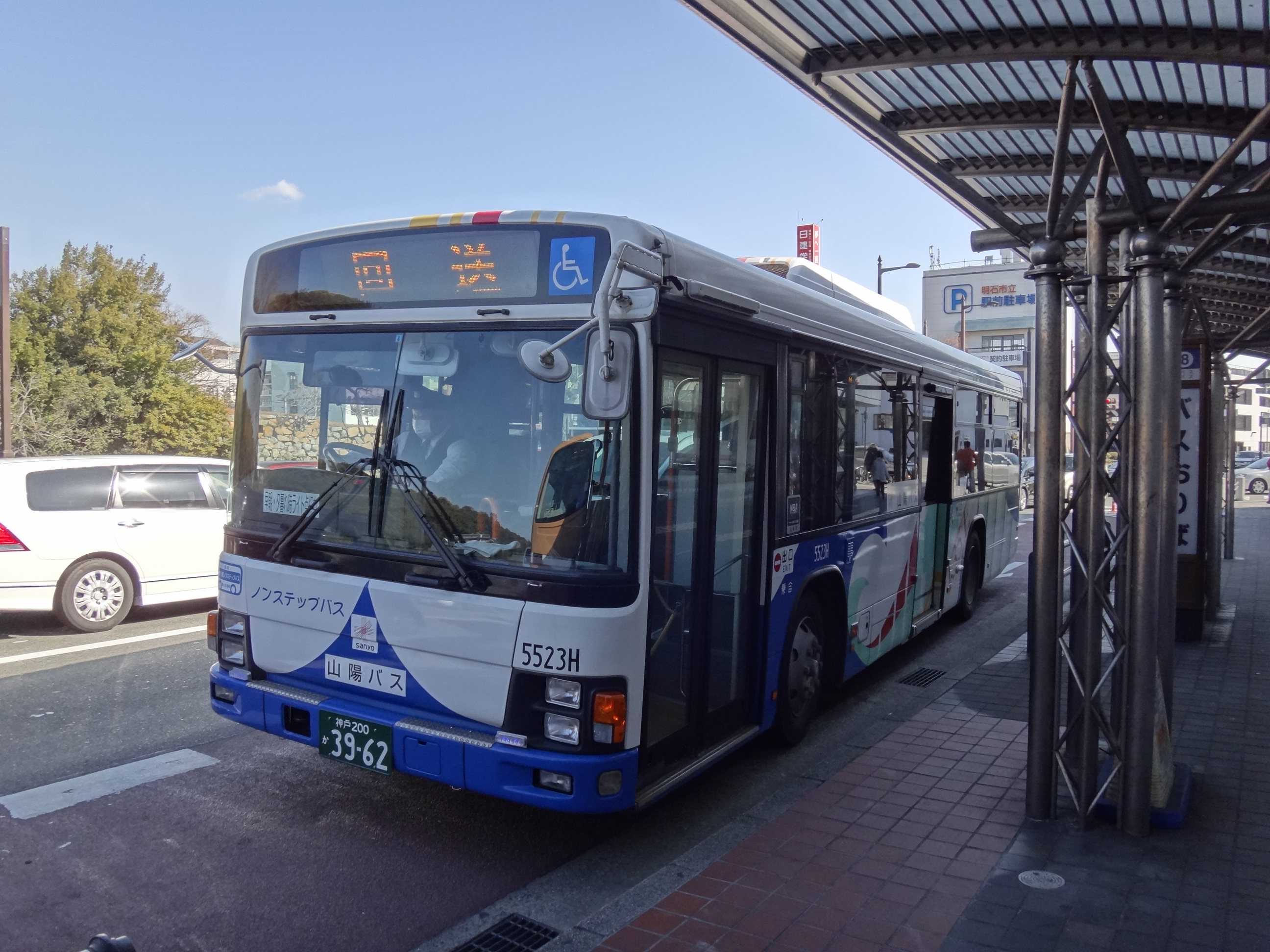 明石市内で運用に就く山陽バス（もと明石市交通部）、日野・ブルーリボンⅡ